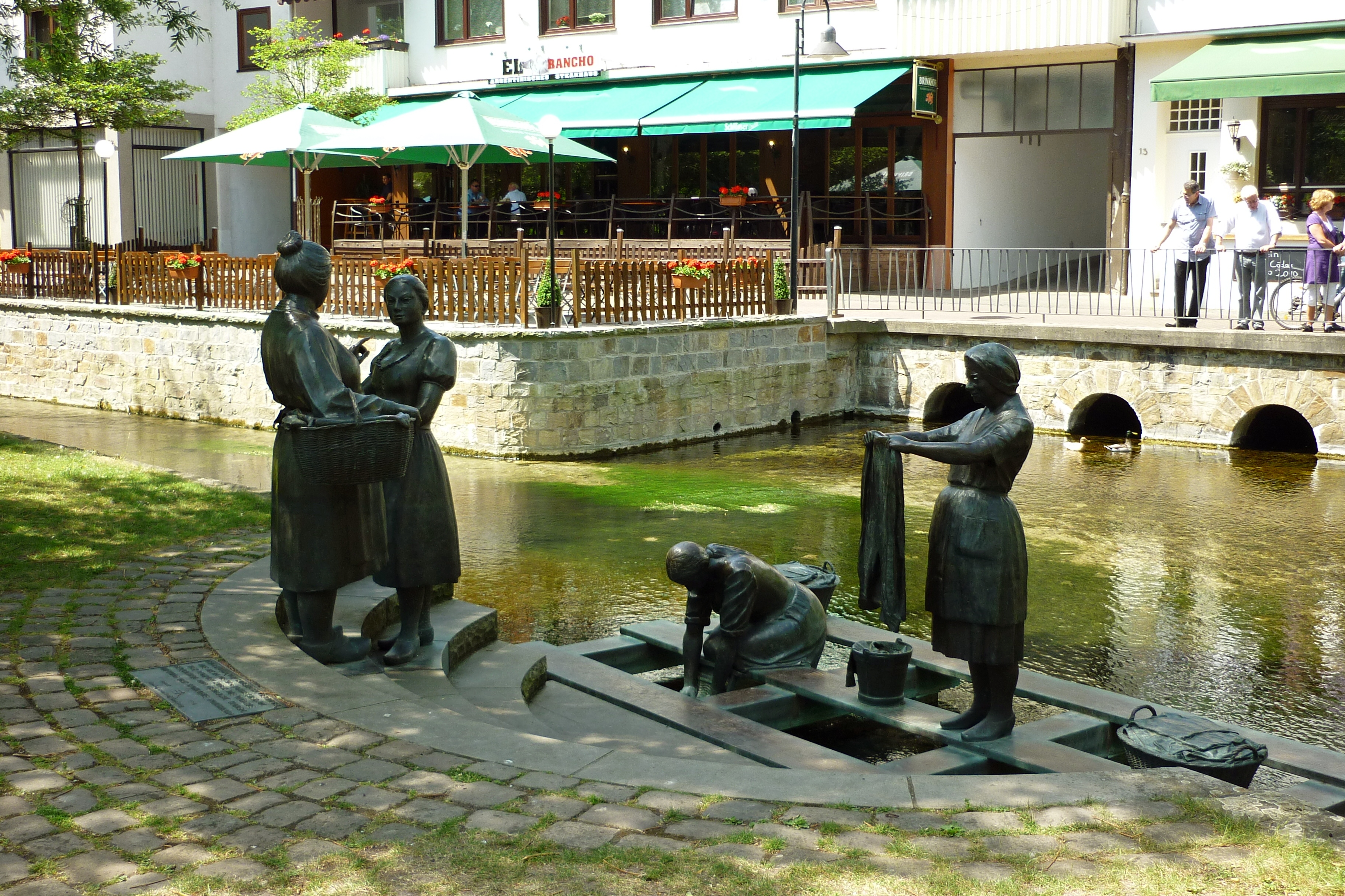 Paderborn: Skulptur Wäscherinnen im Paderquellgebiet.